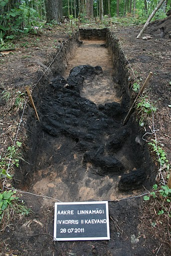 Aakre linnamäel asunud kaevand, kus on näha põlenud puitkonstruktsiooni jäänused.